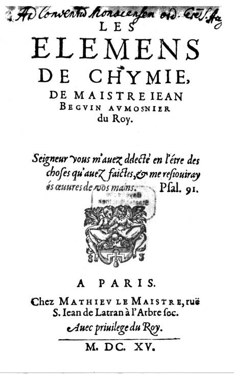 Les Elements de Chymie de Maistre Jean Béguin, 1615